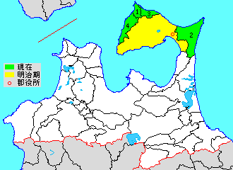 青森県下北郡、県内位置図